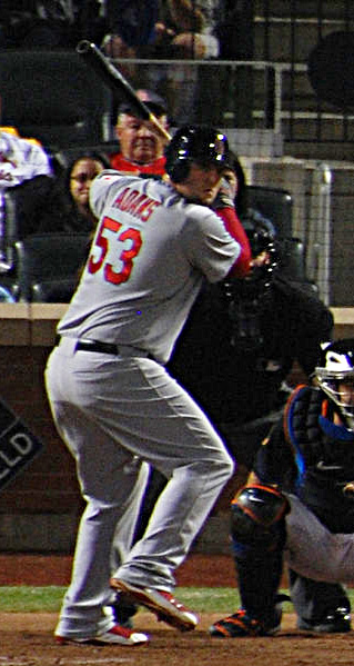 Matt Adams